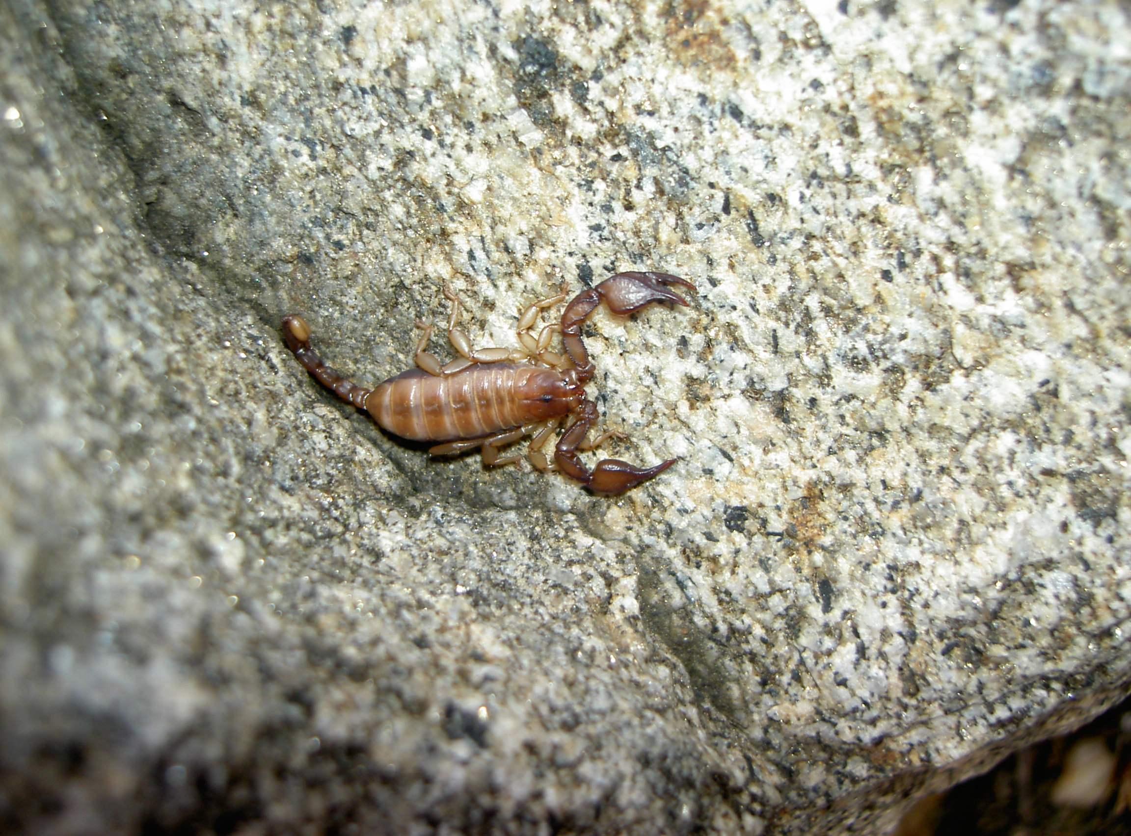 Euscorpius flavicaudis Francie